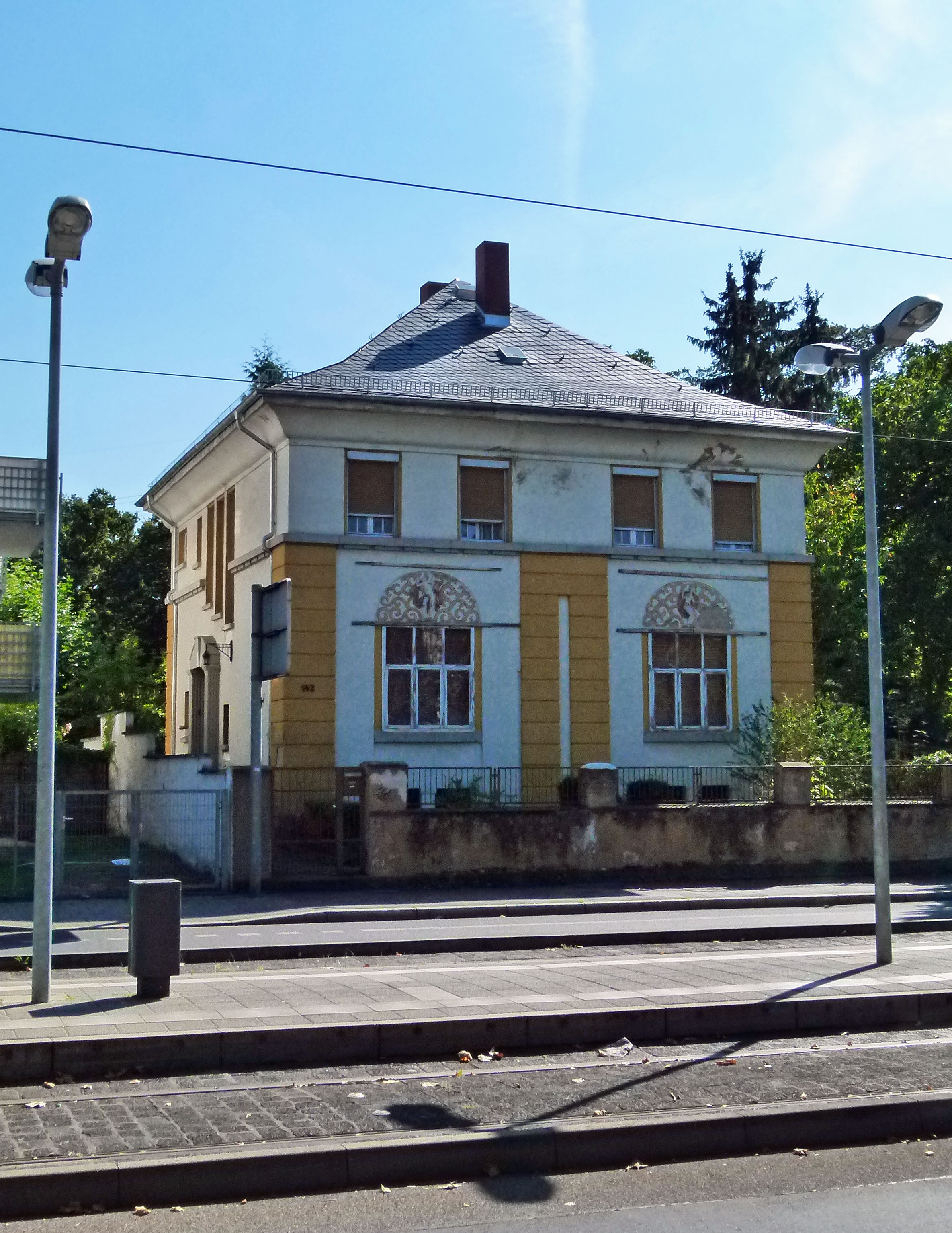 Offenbach am Main, Kernstadt, Frankfurter Strasse 142, Front von der Straße aus